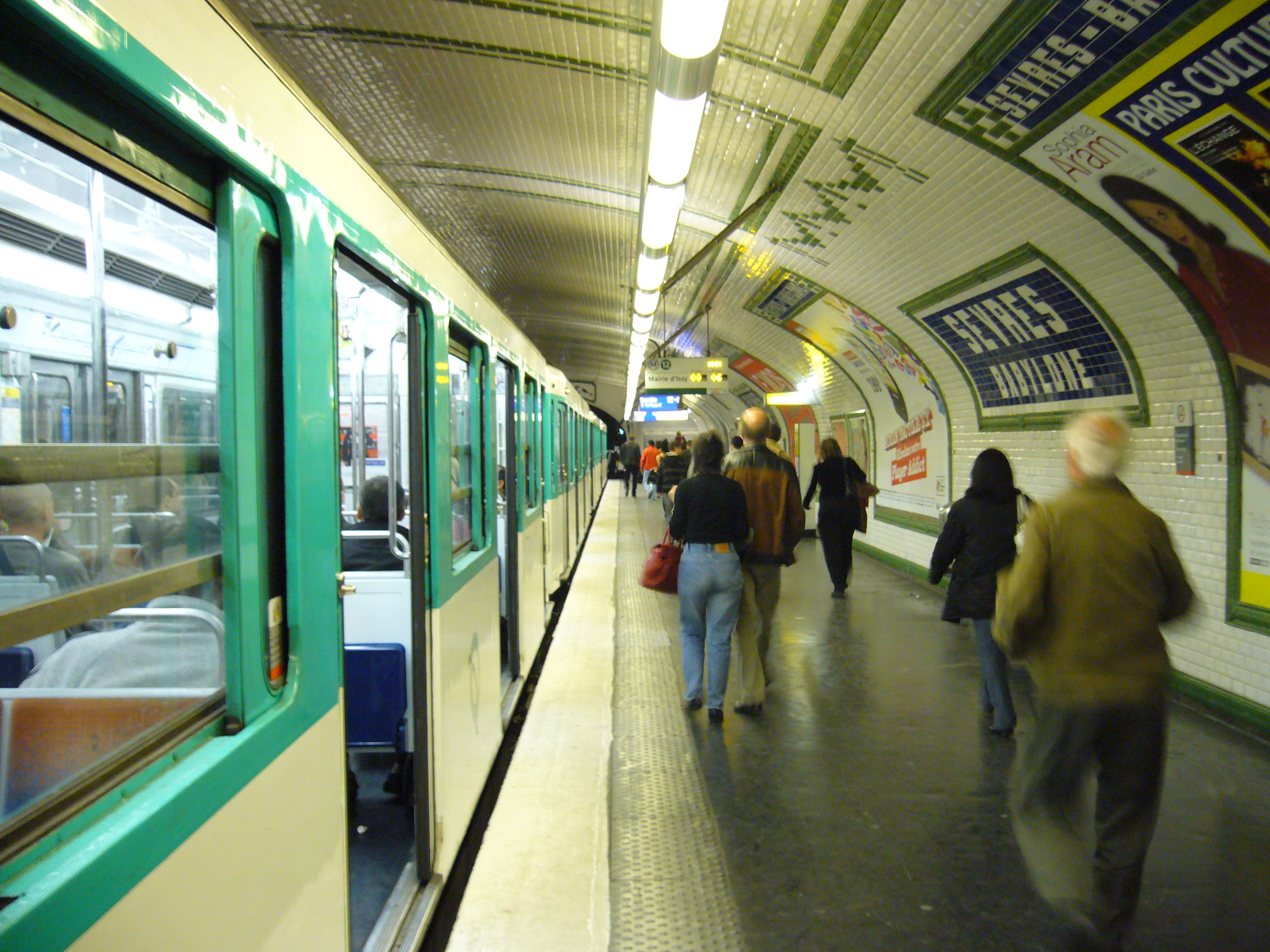 MF 67 à quai à la station Sèves Babylone sur la ligne 12 du métro de Paris.